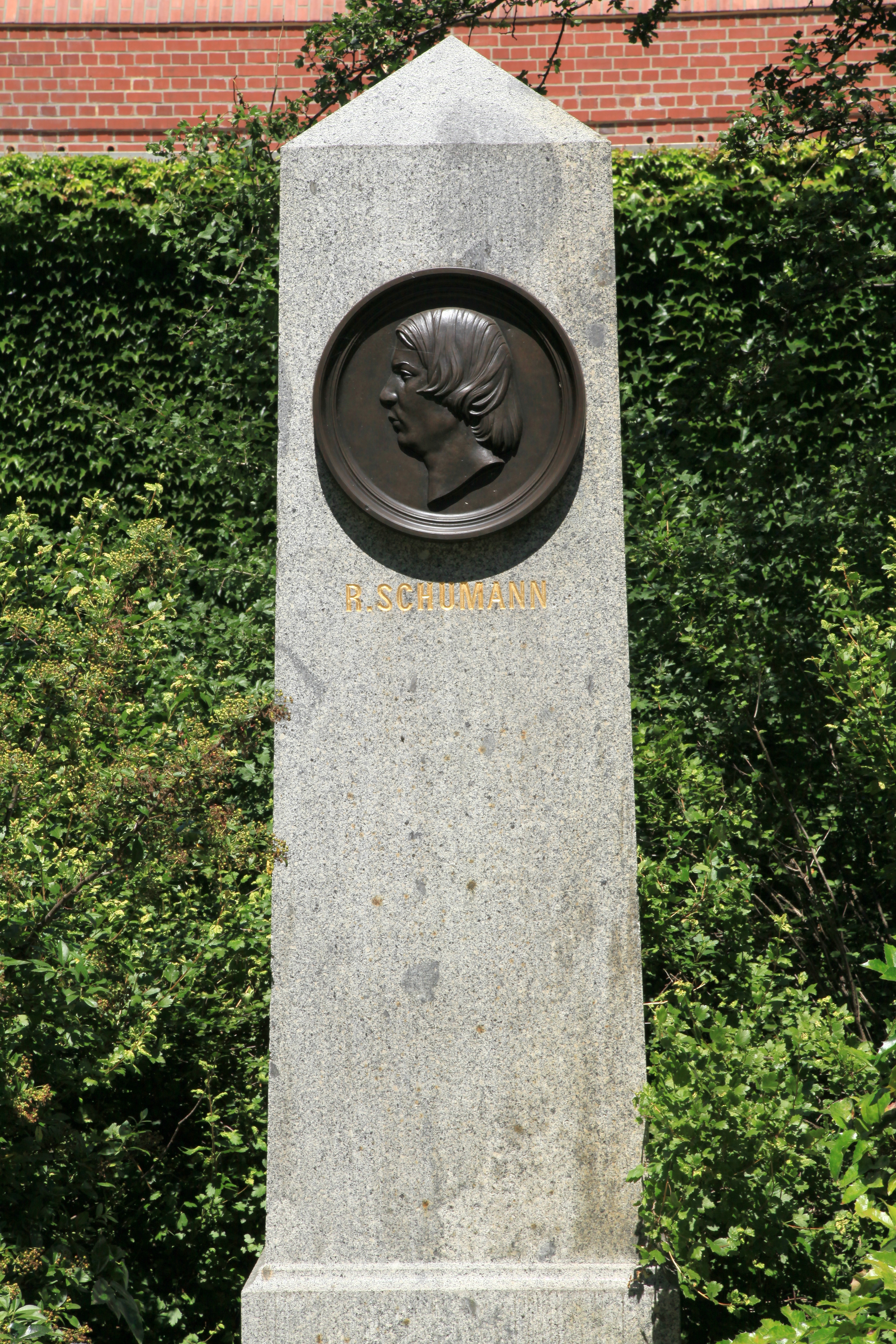 Robert-Schumann-Denkmal, Lennéanlage, Universitätsstraße in Leipzig